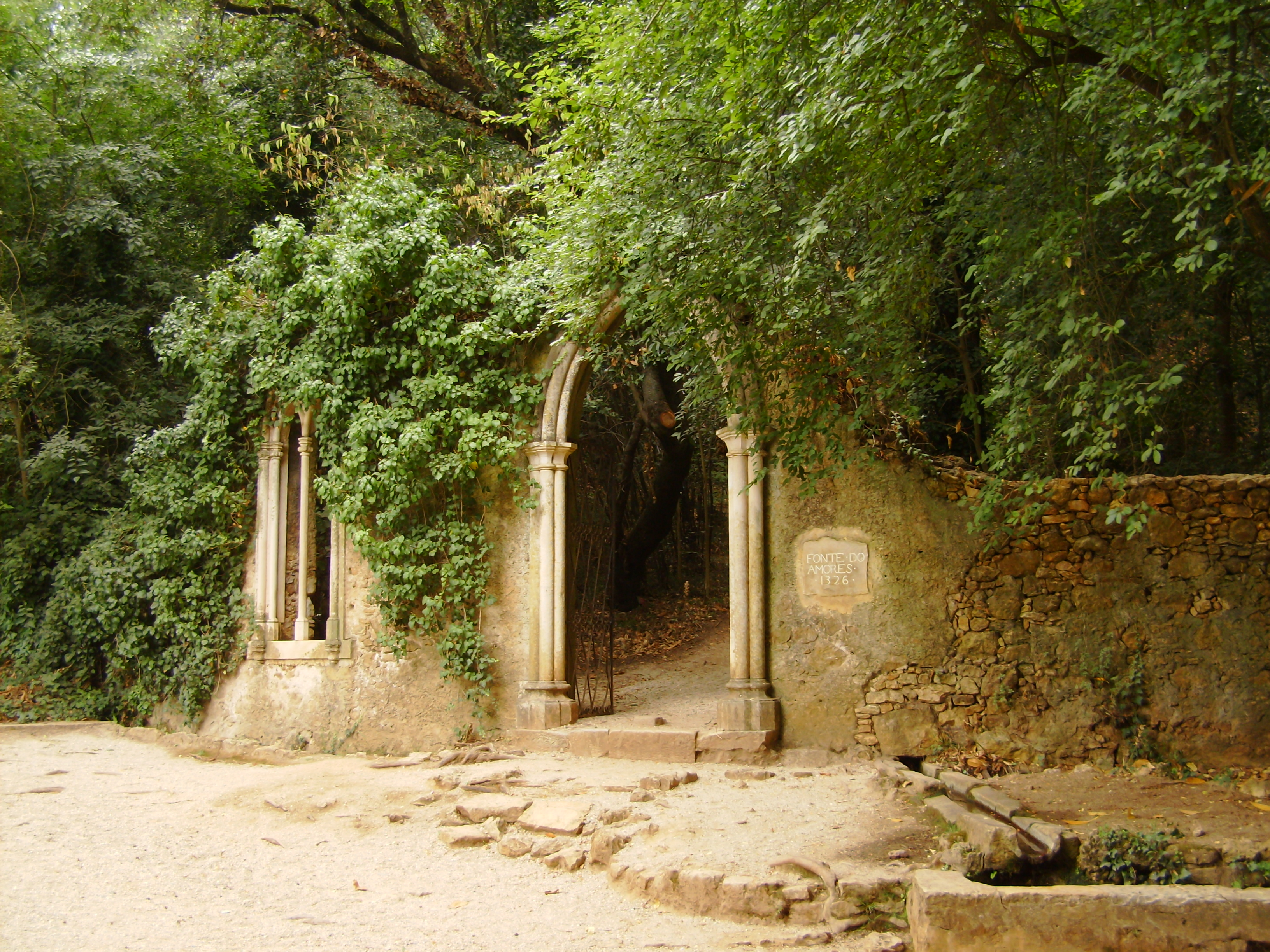 Quinta das Lágrimas, freguesia de Santa Clara, concelho e distrito de Coimbra, Portugal: portal e janela neogóticos na "Fonte dos Amores".